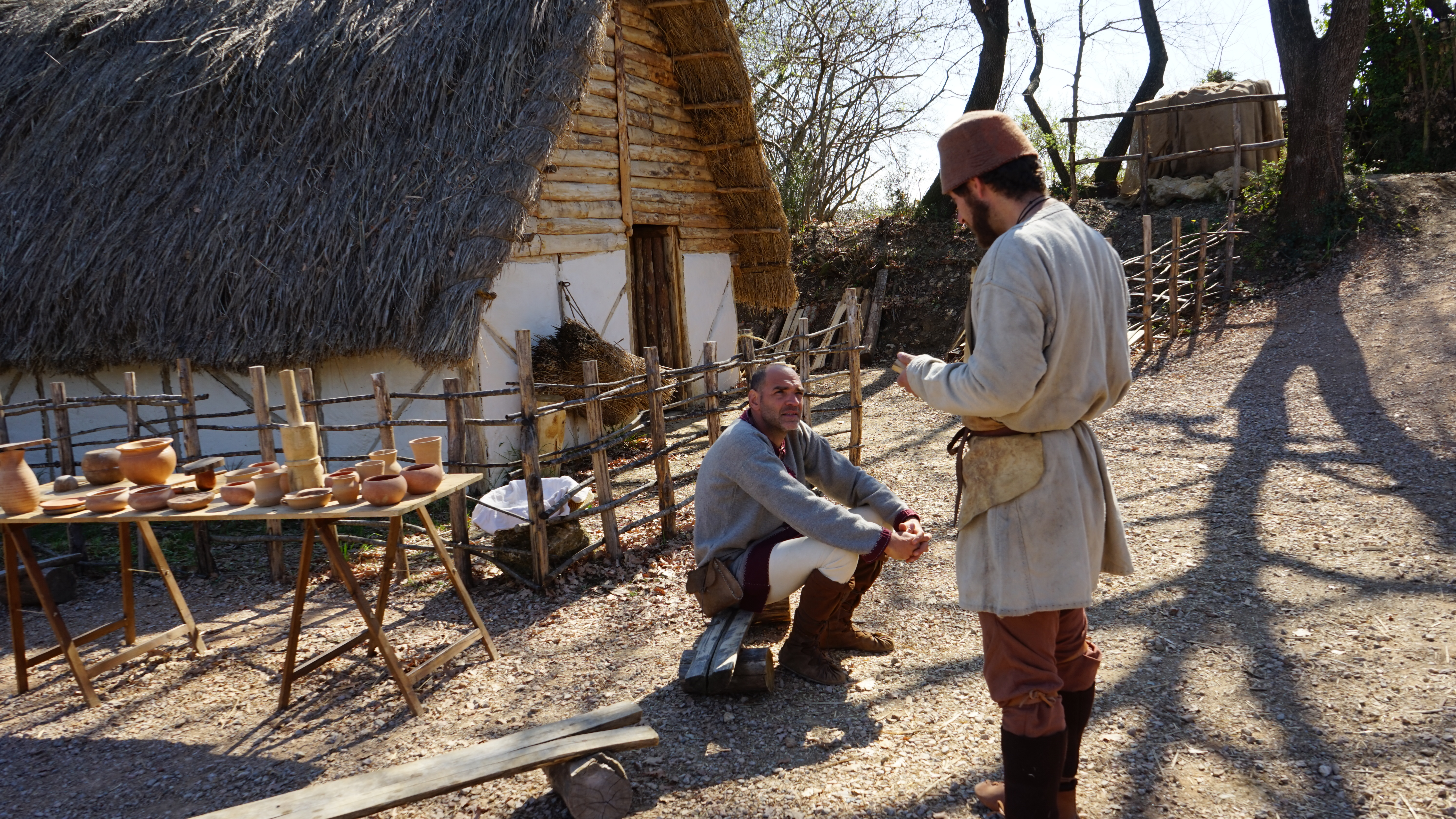 Mura della Fortezza di Poggio Imperiale This is a photo of a monument which is part of cultural heritage of Italy.